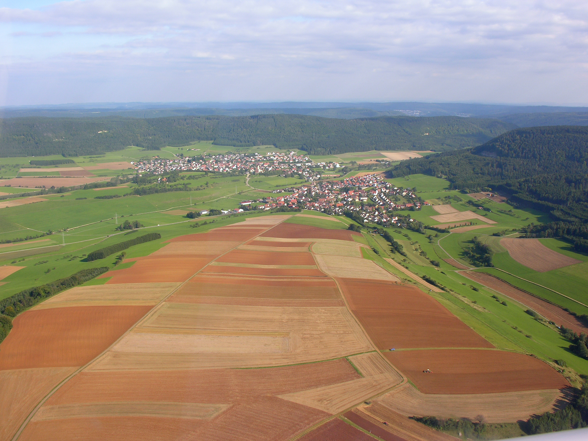 Germany, Baden-Württemberg, aerial view of Seitingen-Oberflacht